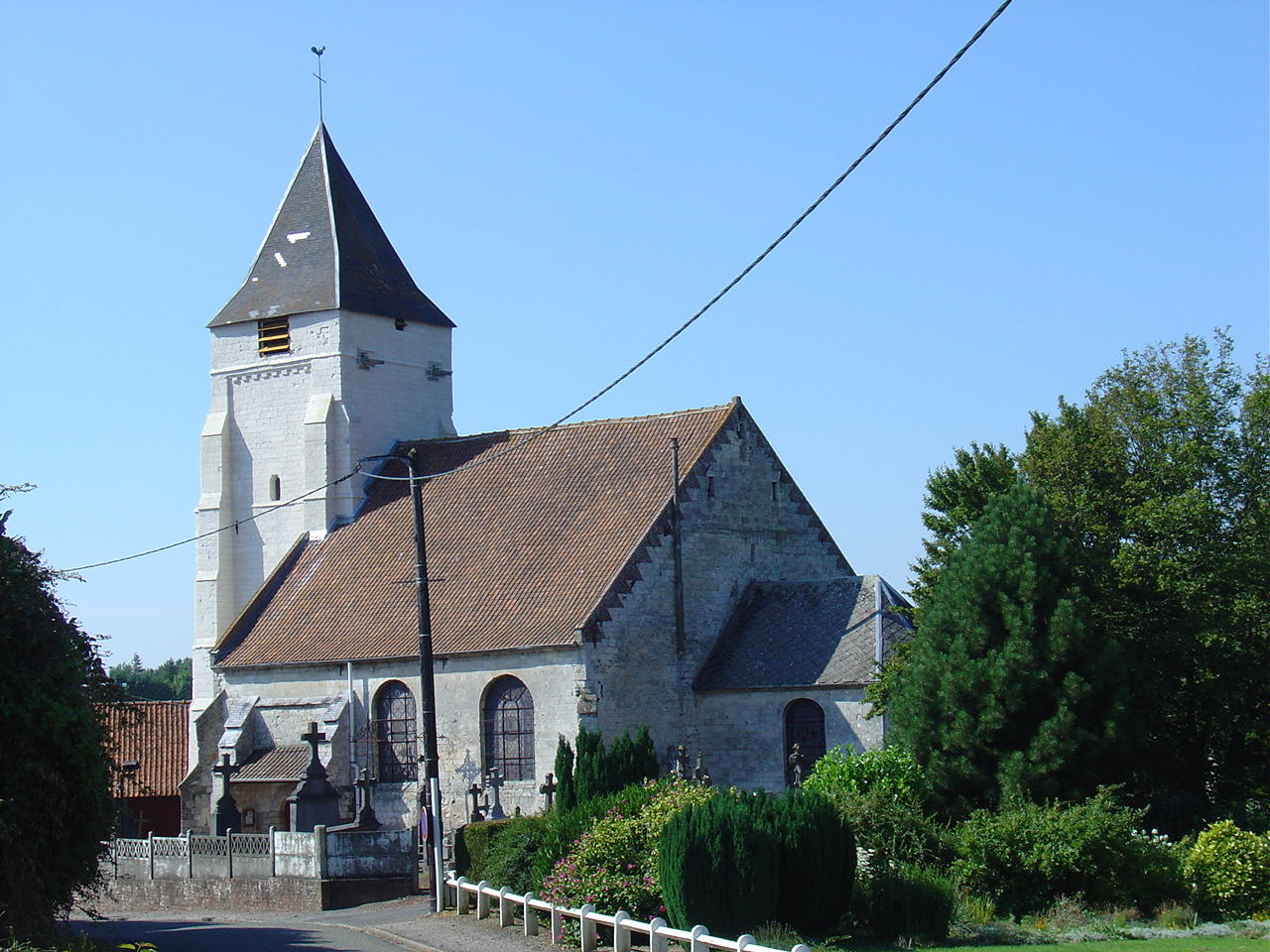 Église de Magnicourt-en-Comté